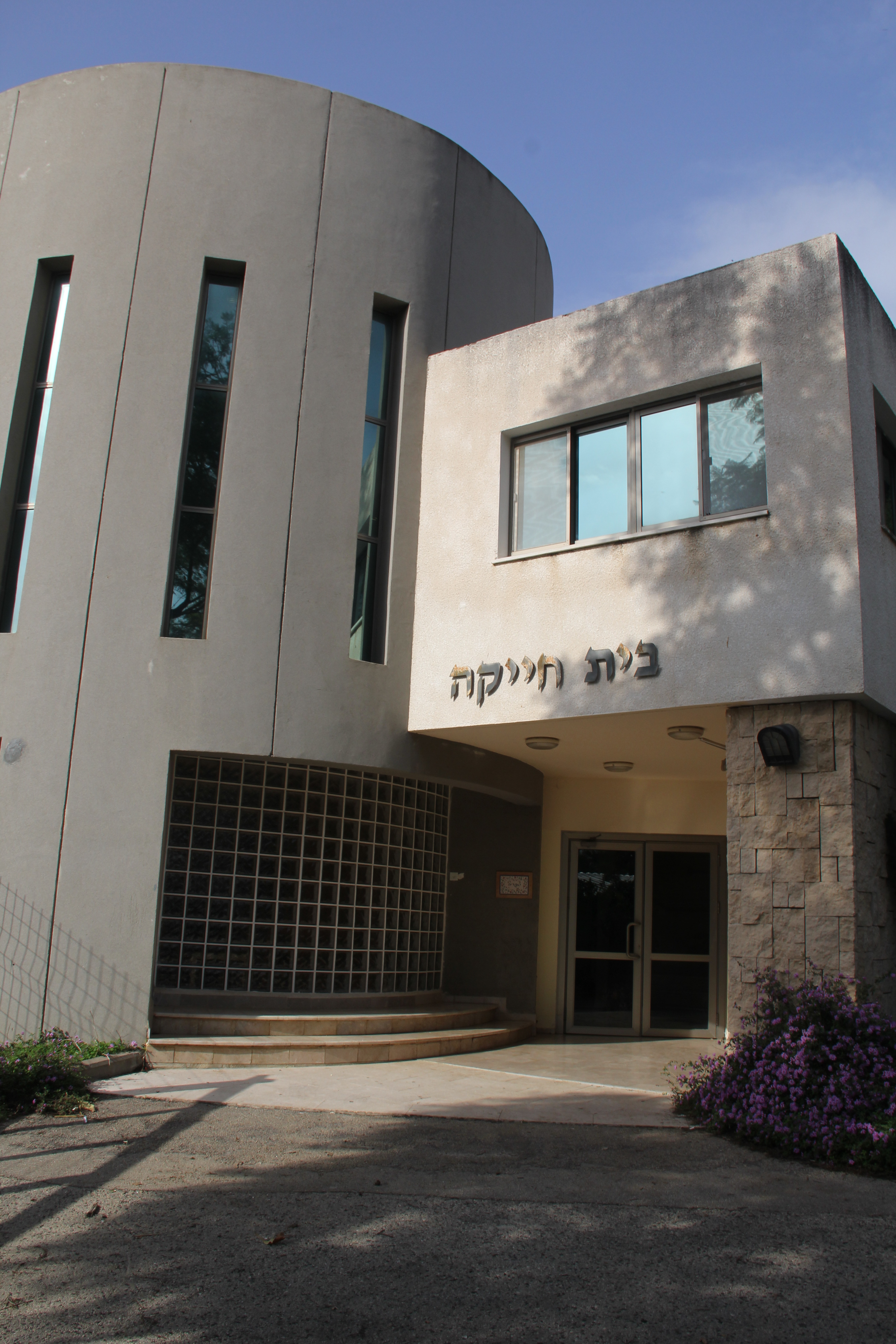 בית חייקה